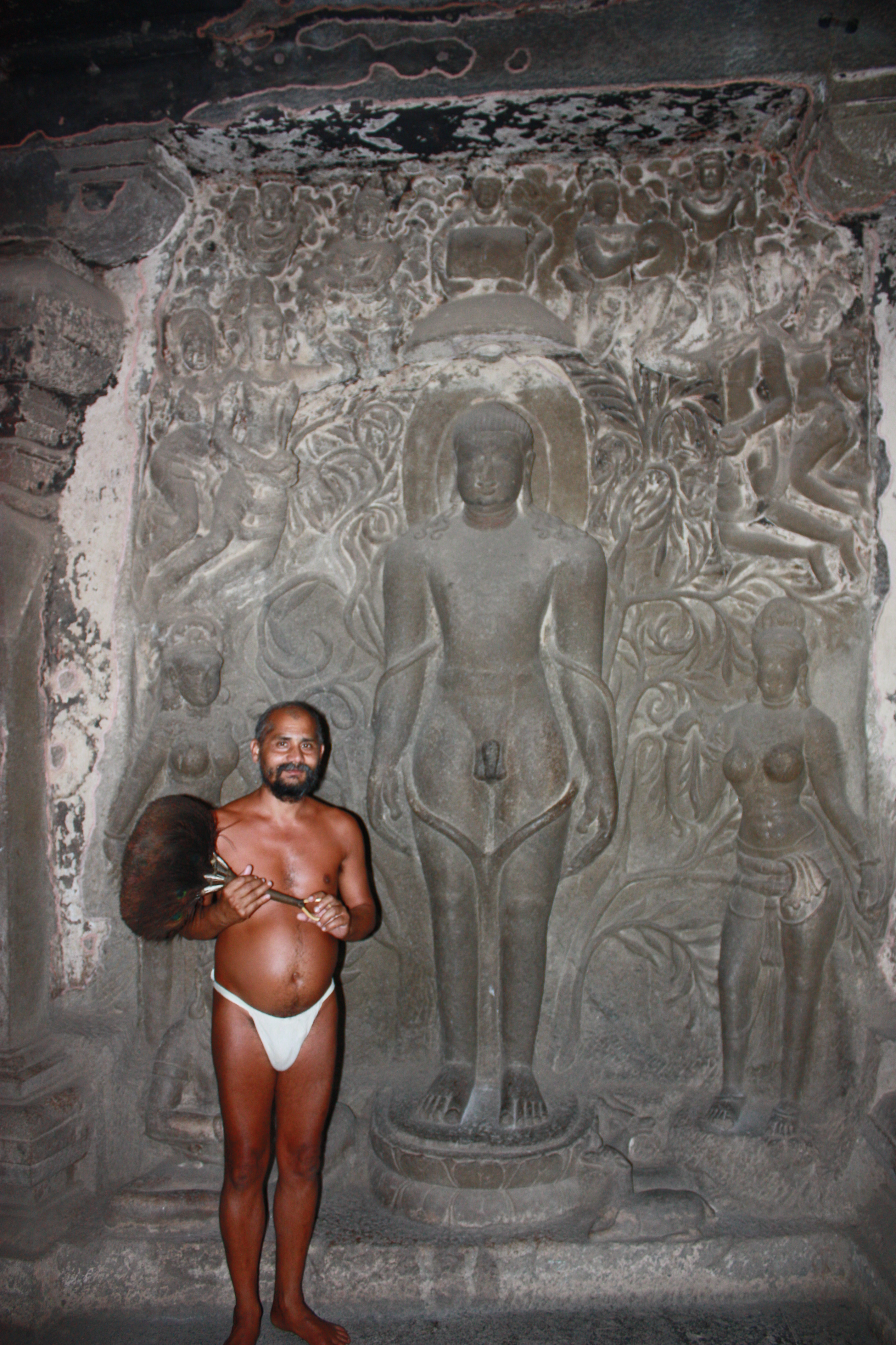 Ellora, Jain guru in cave 32